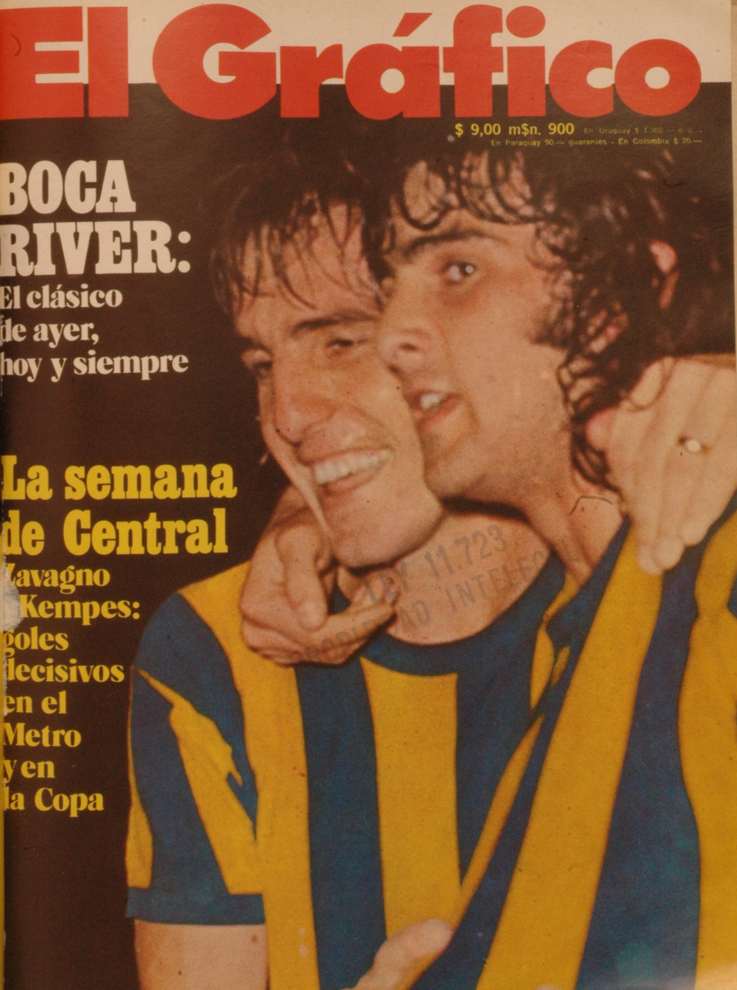 El Grafico del 16 de Abril de 1975. Edicion 2897